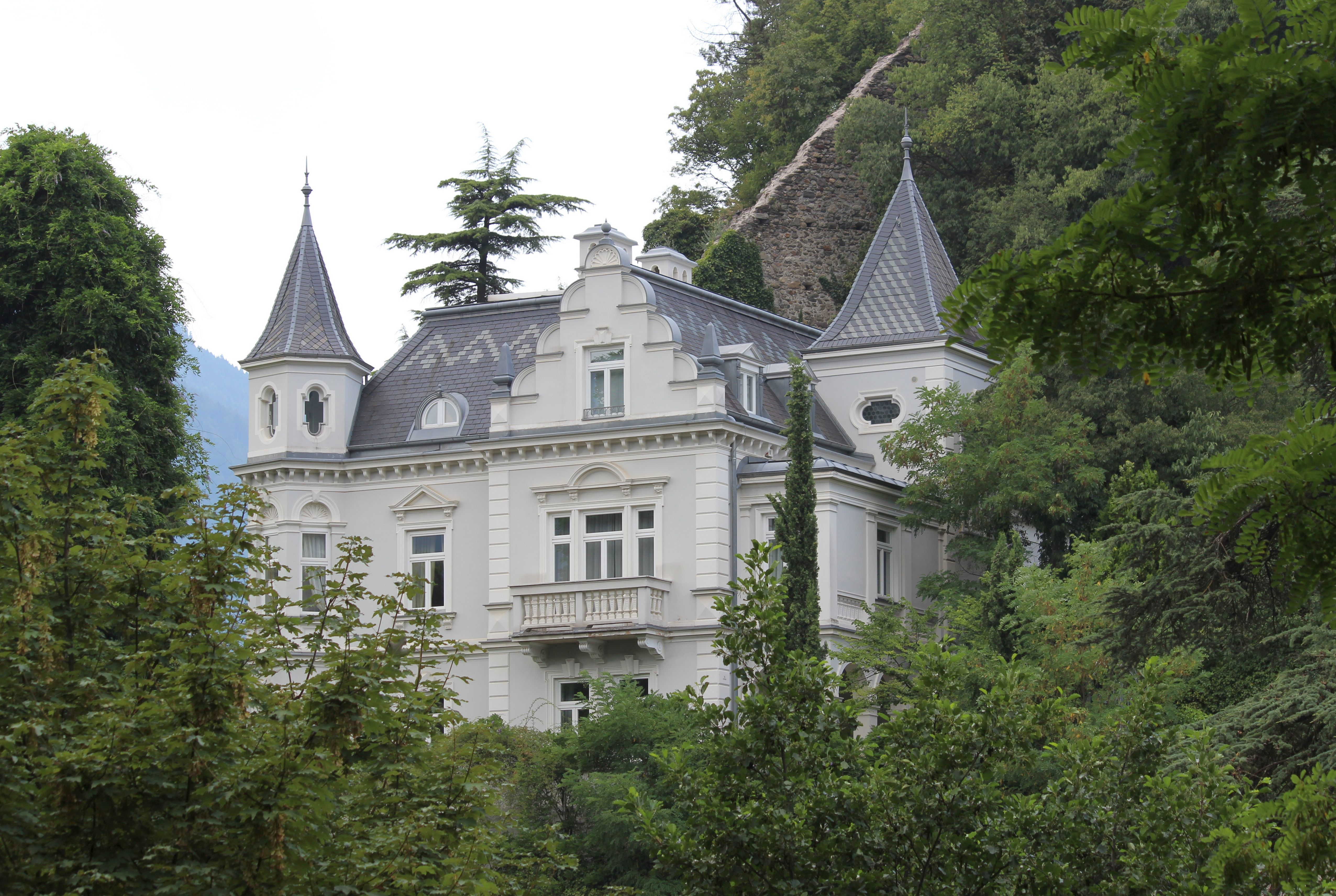 Passerschlössl, Zenobergstraße 5 in Meran